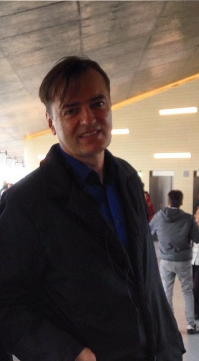 Patrik Schumacher